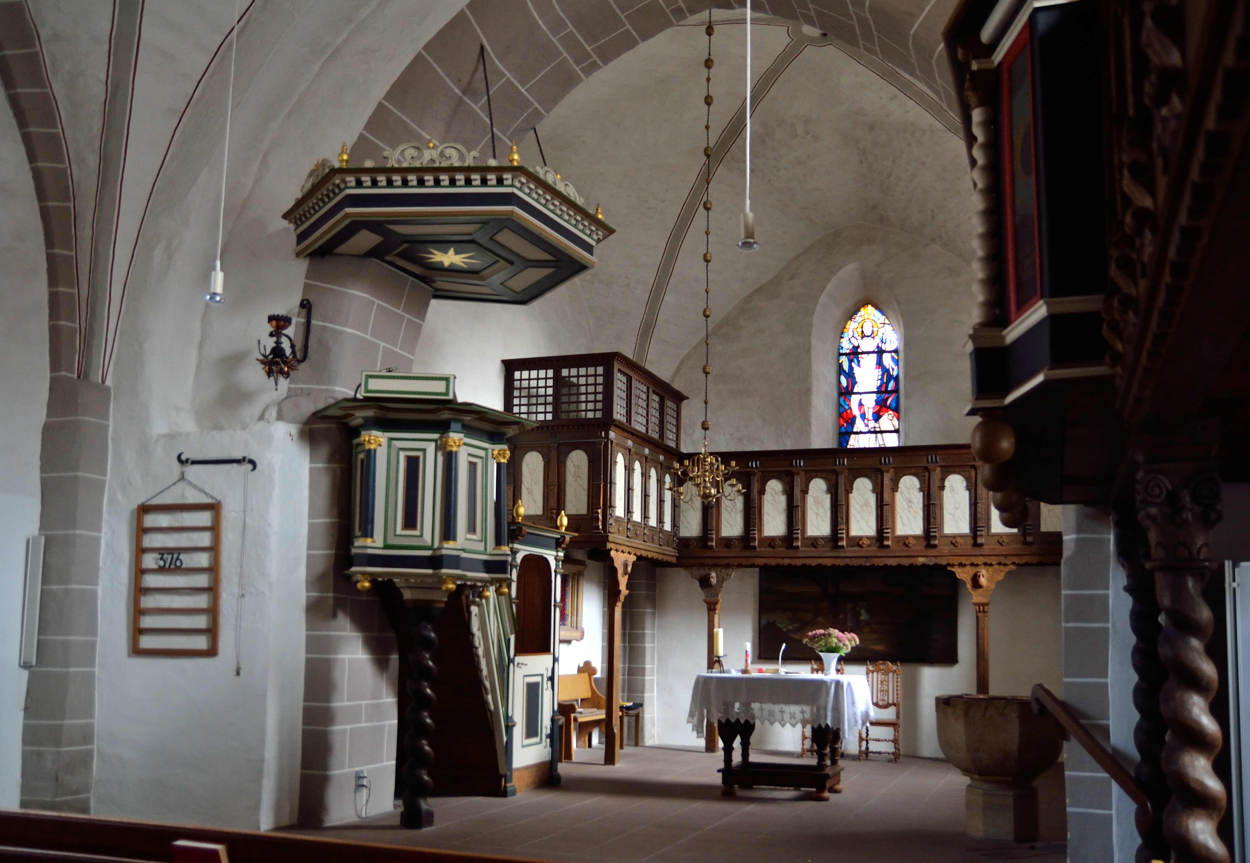 This is a photograph of an architectural monument. Evangelisch-reformierte Kirche Schwalenberg